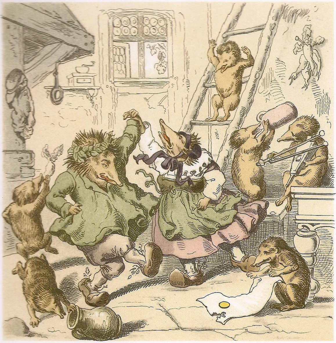 Het Wettloopen tüschen den Haasen un den Swinegel